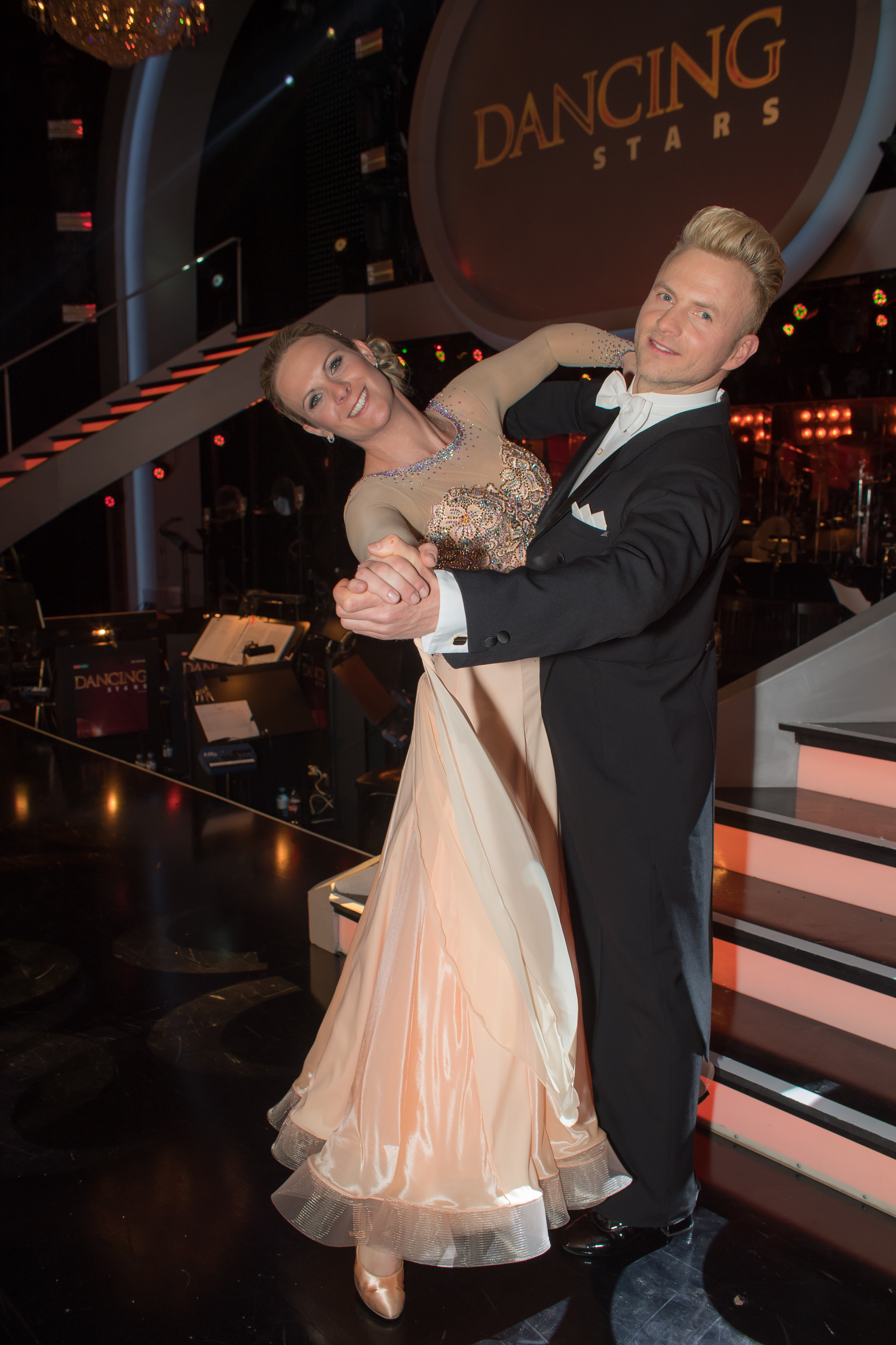 ORF Dancing Stars am 7. April 2017 in Wien. Bild zeigt Nicole Hosp und Willi Gabalier.